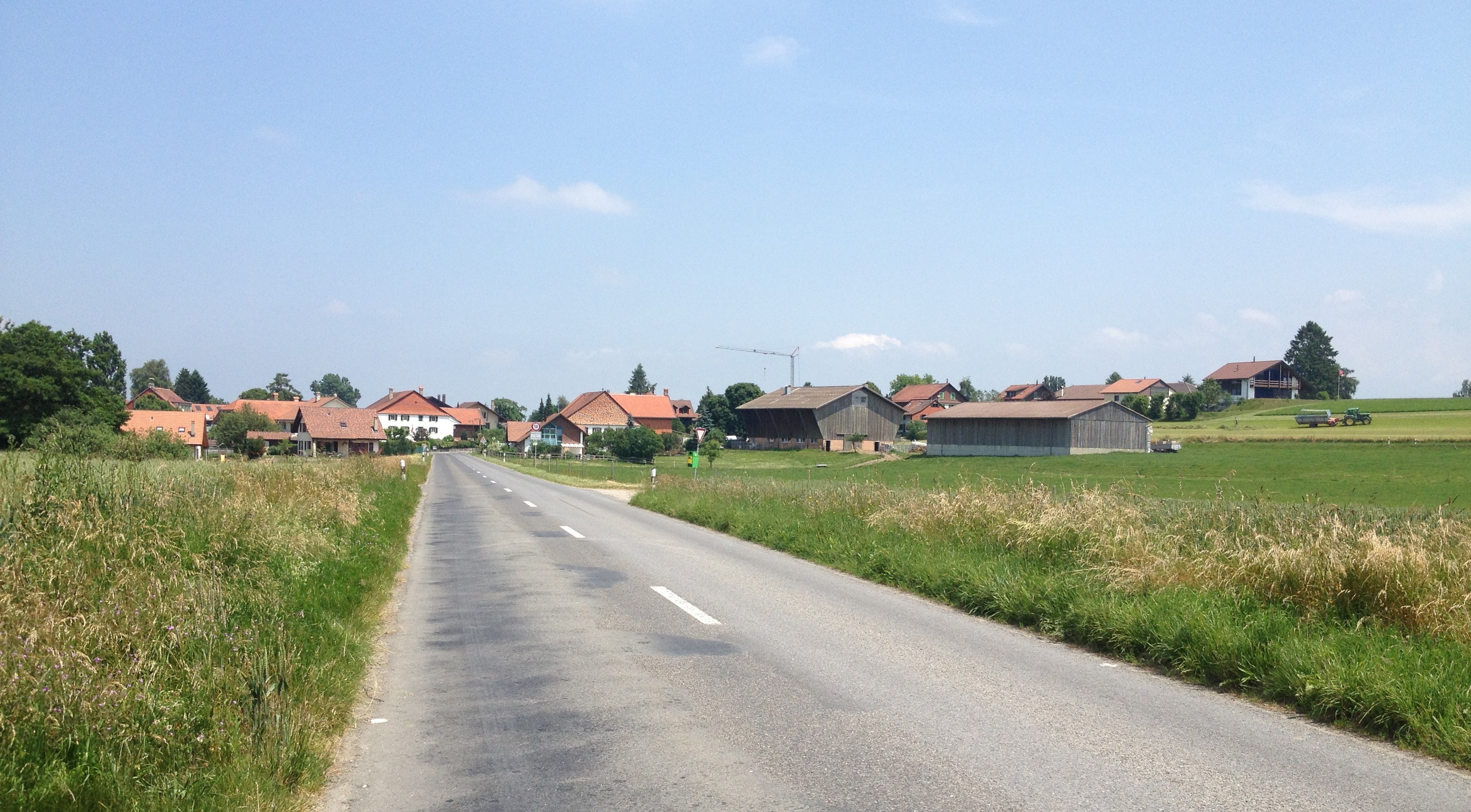 Peney-le-Jorat dans la commune suisse de Jorat-Menthue.